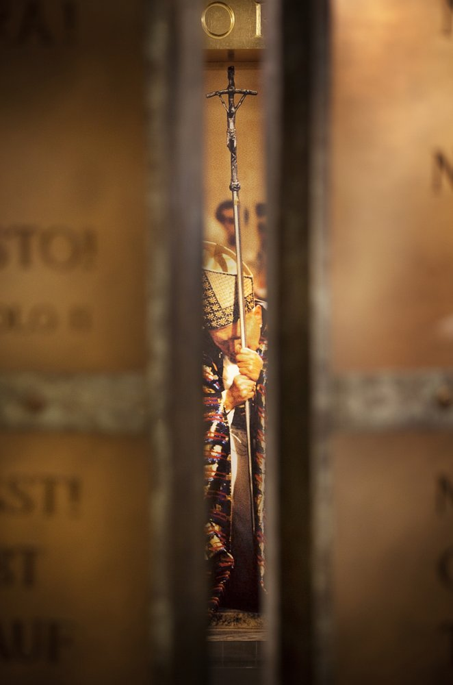 Replika drzwi świętych